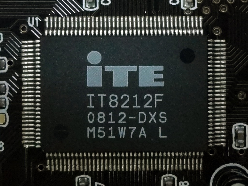 聯陽半導體ATA控制晶片IT8212F 0812-DXS。